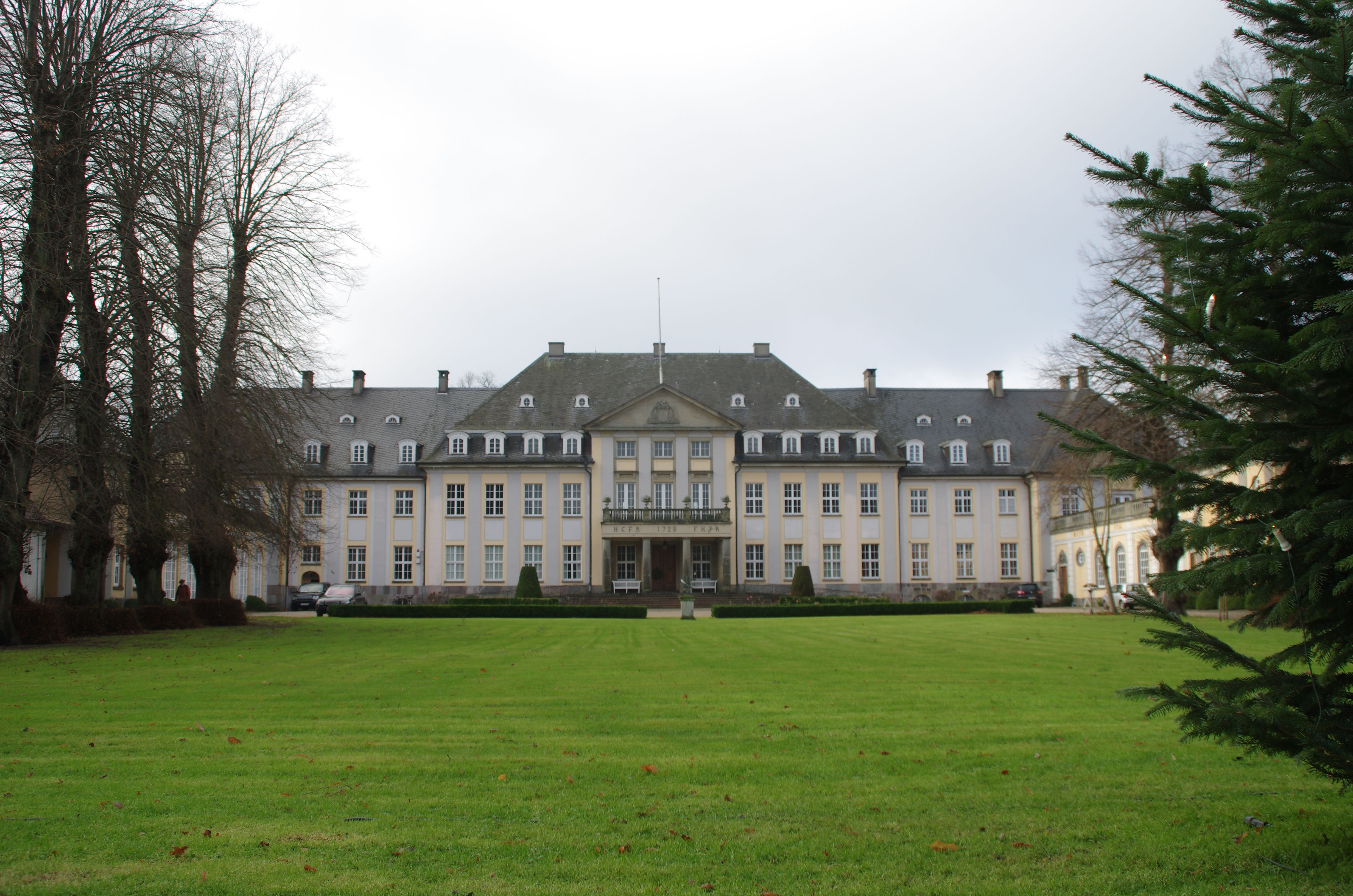 Altenhof bei Eckernförde in Schleswig-Holstein. Die Fassade des Herrenhauses stammt aus dem Jahr 1910, das Haus im Kern aus dem Jahr 1728.